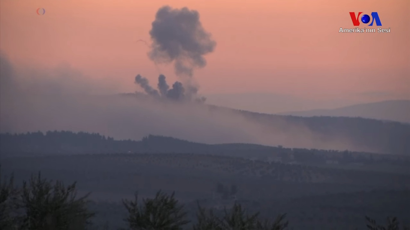 Türkiye, sınır güvenliği gerekçesiyle Fırat Kalkanı Operasyonu ardından bugün de Zeytindalı Operasyonu ile Suriye topraklarında terör örgütleriyle mücadele çerçevesinde Özgür Suriye Ordusu (ÖSO) yapılanmasıyla birlikte askeri harekata başladı.